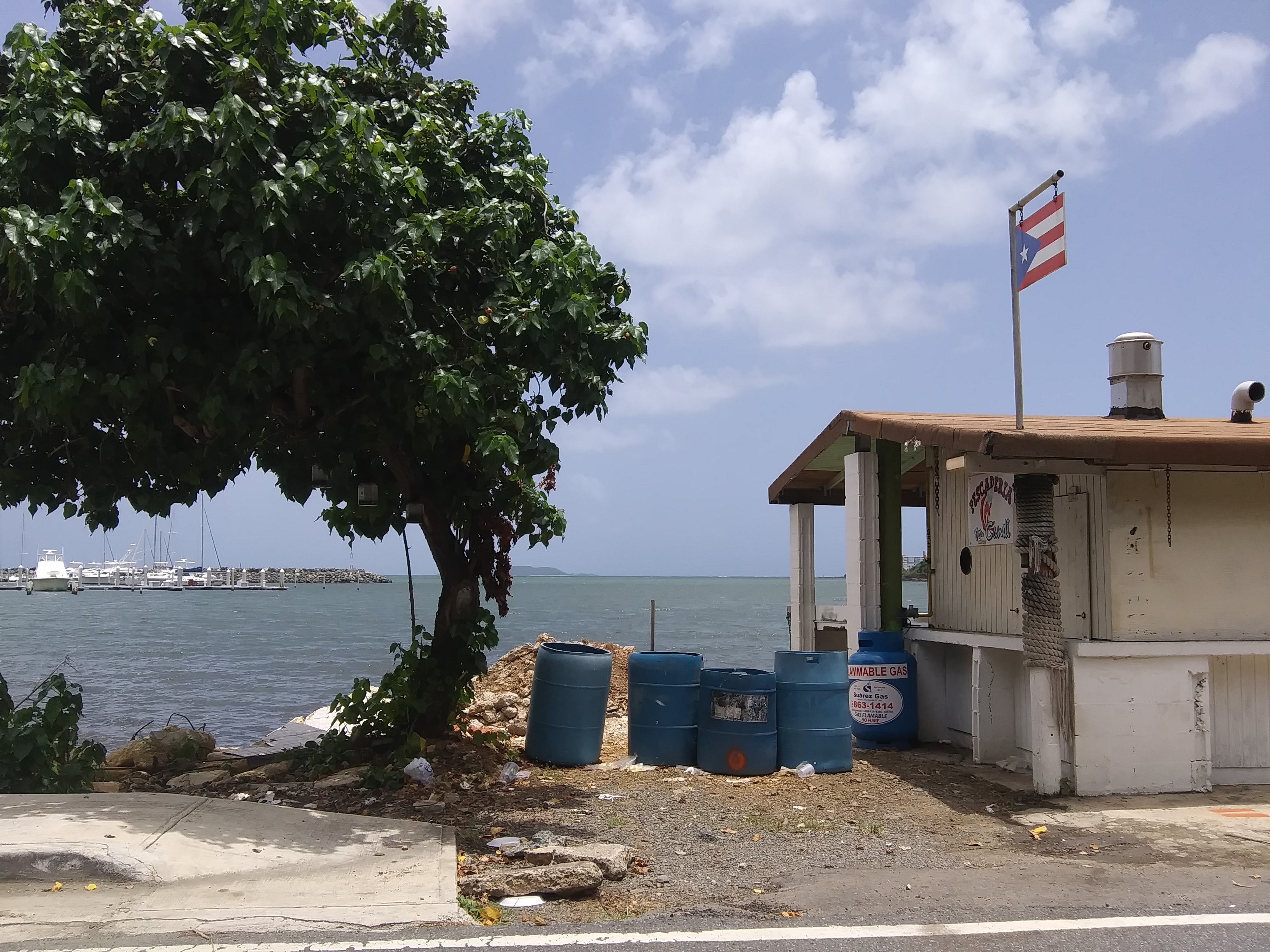 Zona pesquera en Barrio Sardinera en Fajardo, Puerto Rico